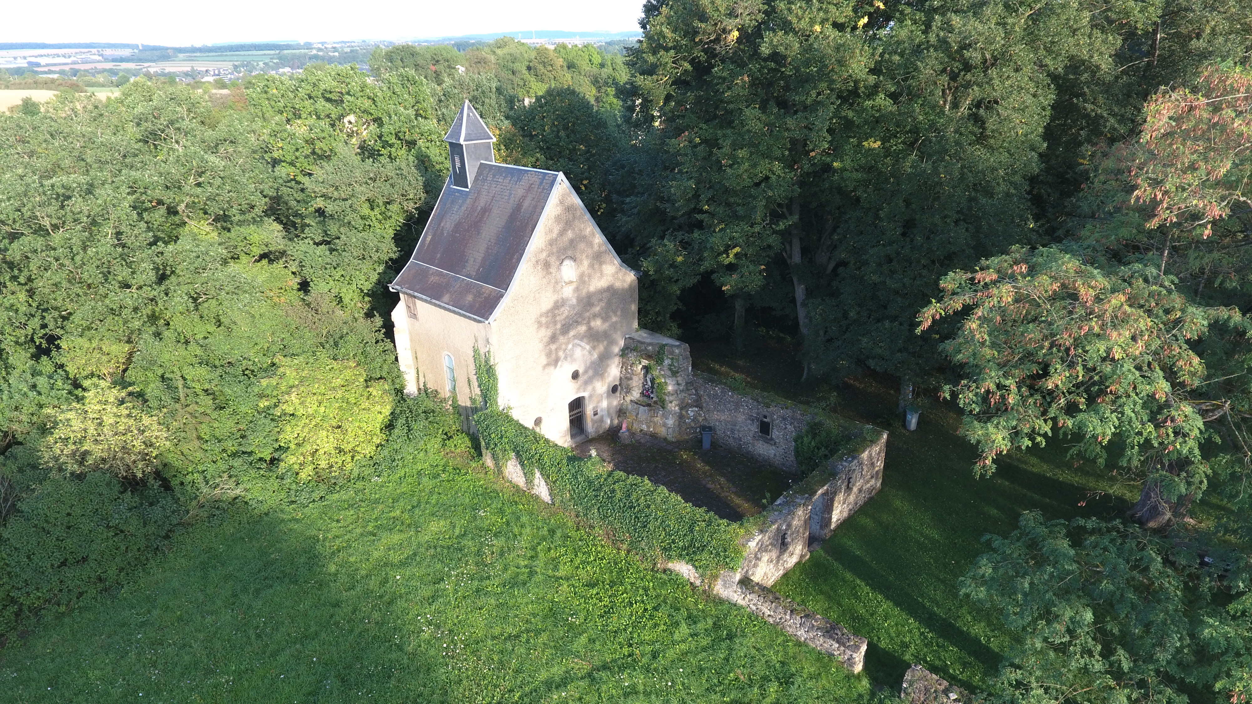 De Kaaschtel - e Kastell an eng Kapell a Loutrengen (Frankräich) bei Altwis a Munneref.